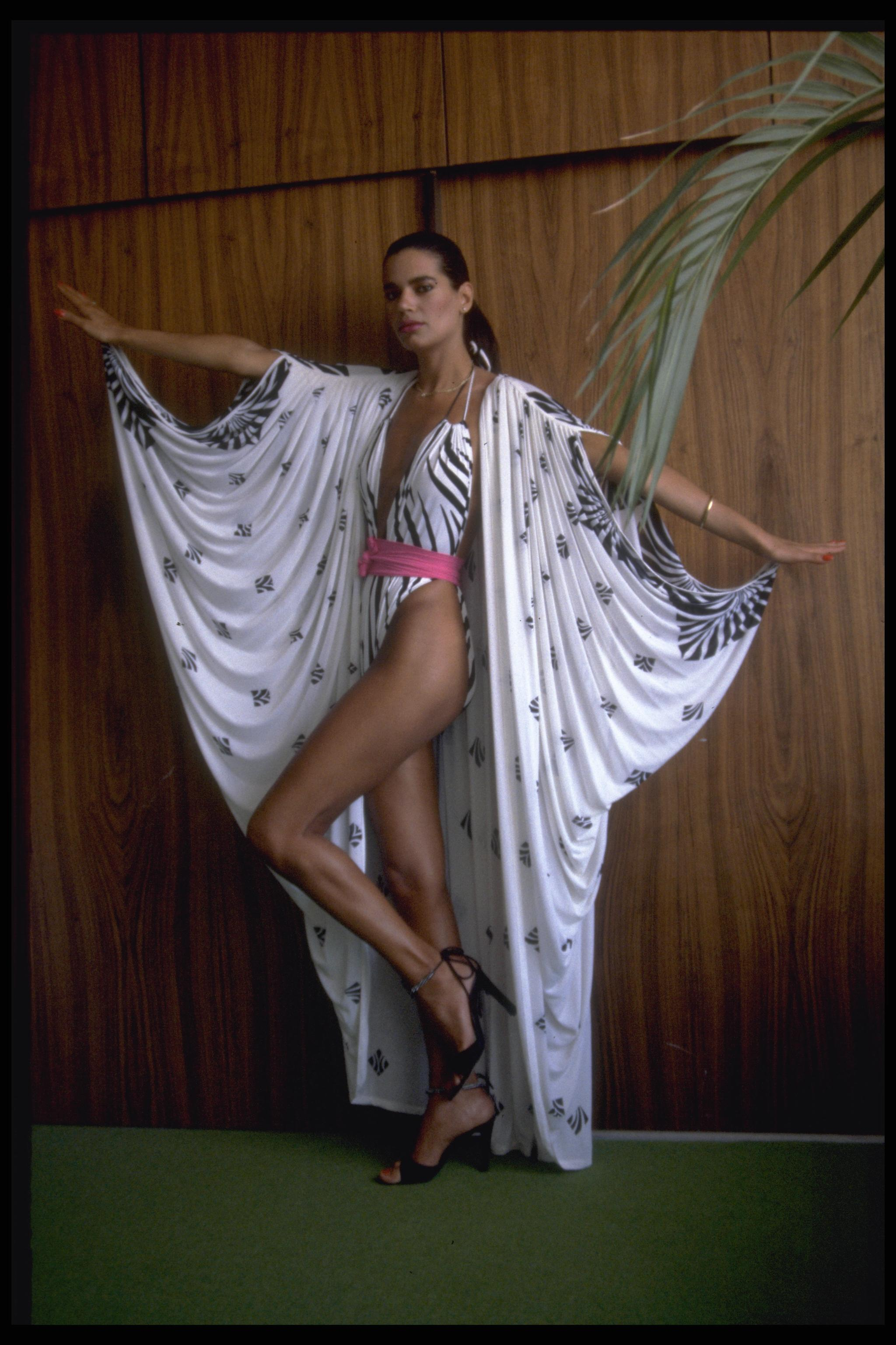 Model Tami Ben Ami in a Gottex bathing suit. הדוגמנית, תמי בן עמי, בבגד ים של גוטקס